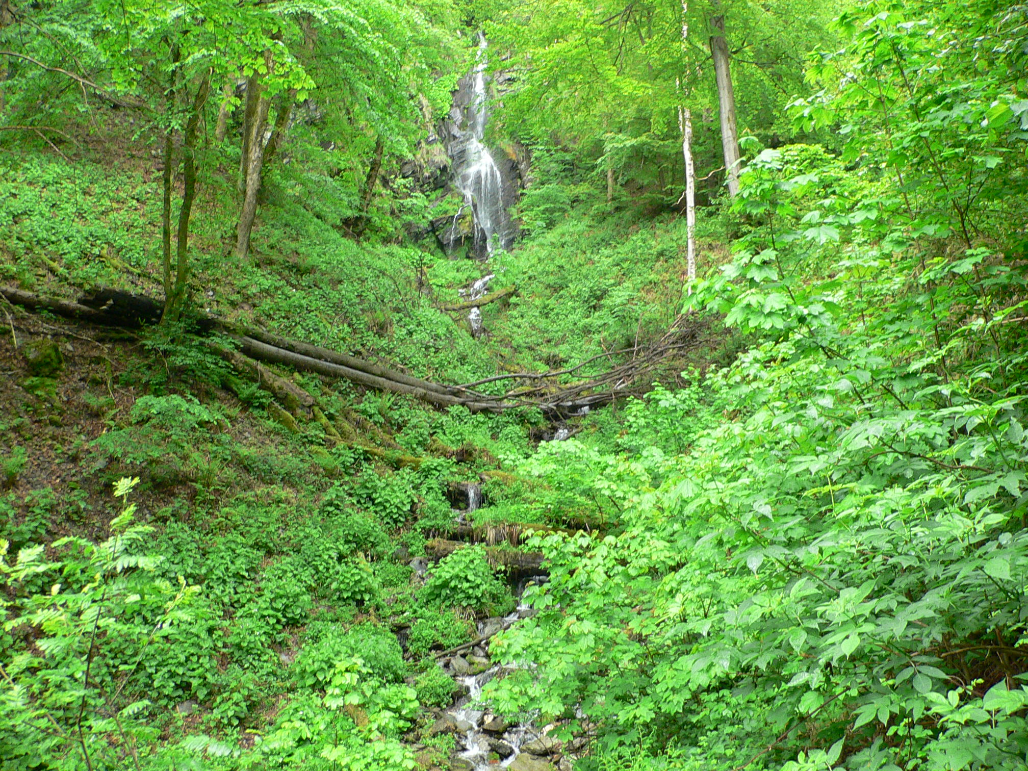 Wasserfall Plästerlegge bei Bestwig-Wasserfall in Nordrhein-Westfalen